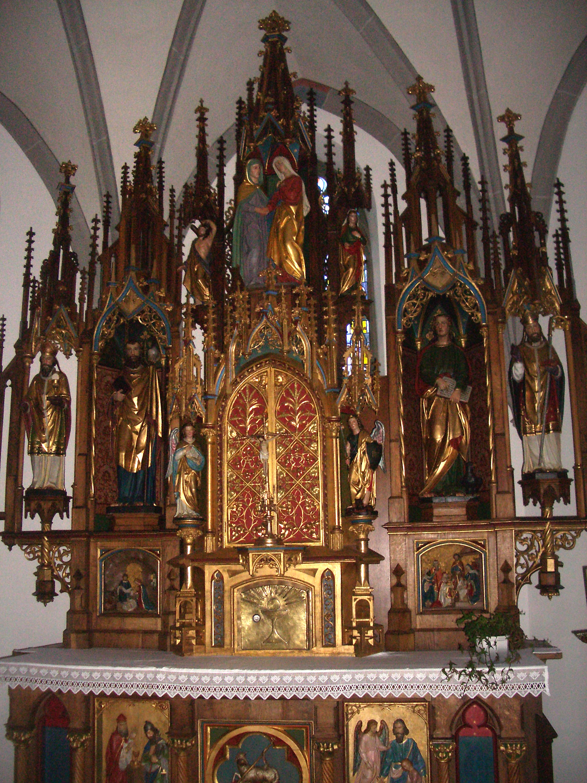 Unterwaldhausen, Landkreis Ravensburg: Katholische Pfarrkirche Allerheiligen, neugotischer Hochaltar (renoviert ca. 2005)